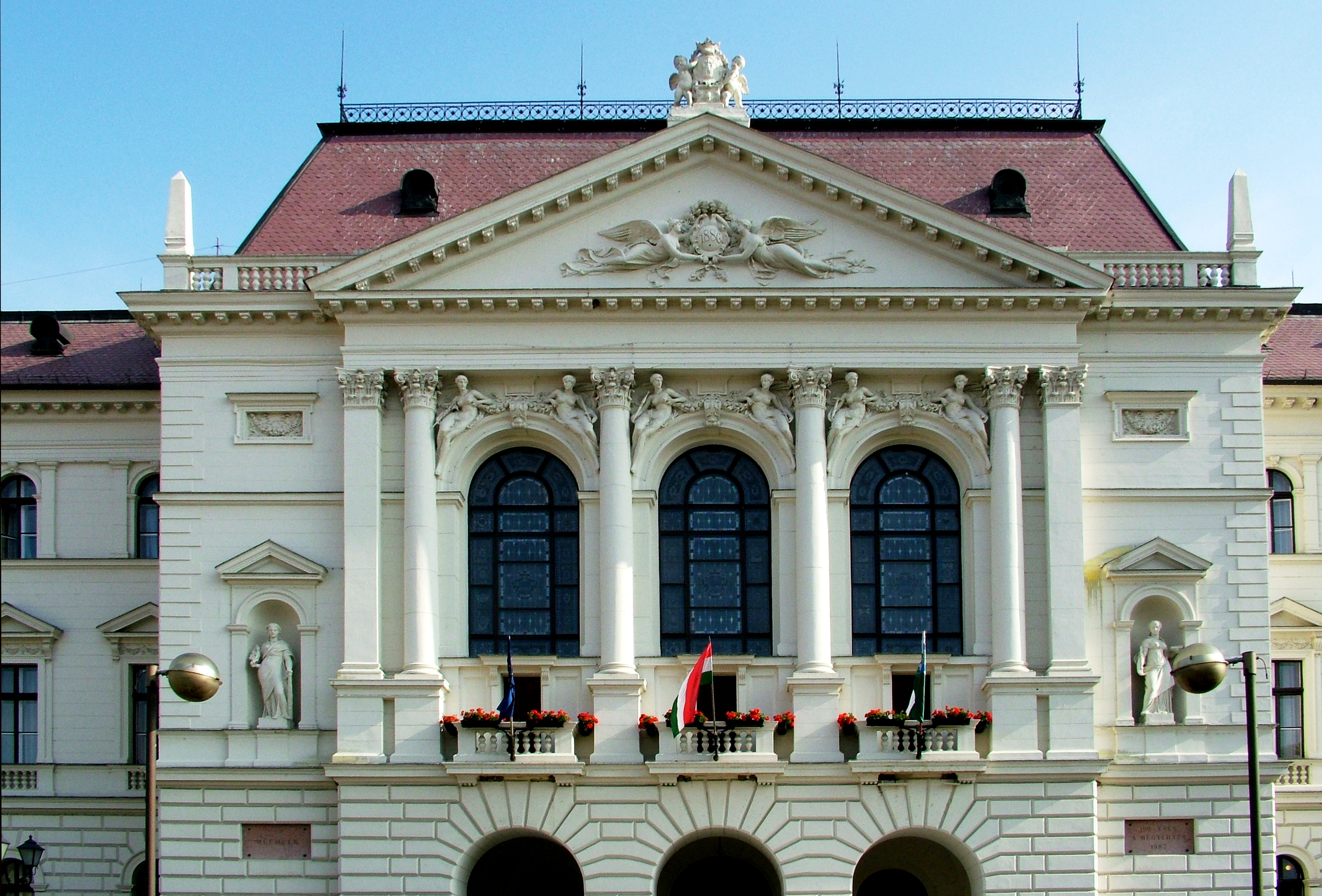 Veszprémi megyeháza: homlokzati részlet